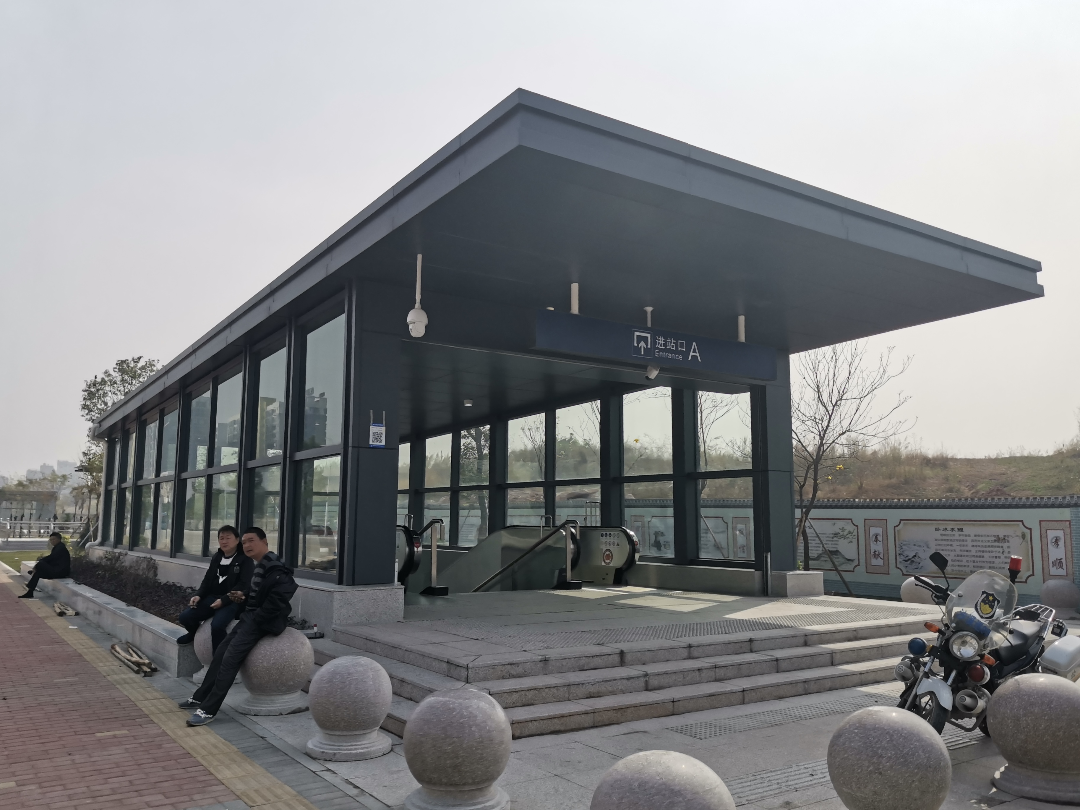 厚街站A出口